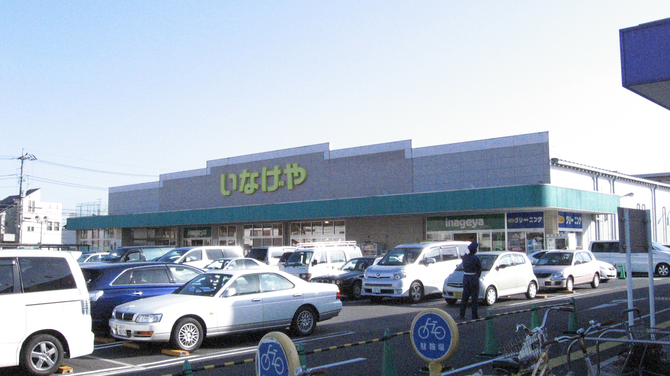 いなげや練馬上石神井南店（東京都練馬区）